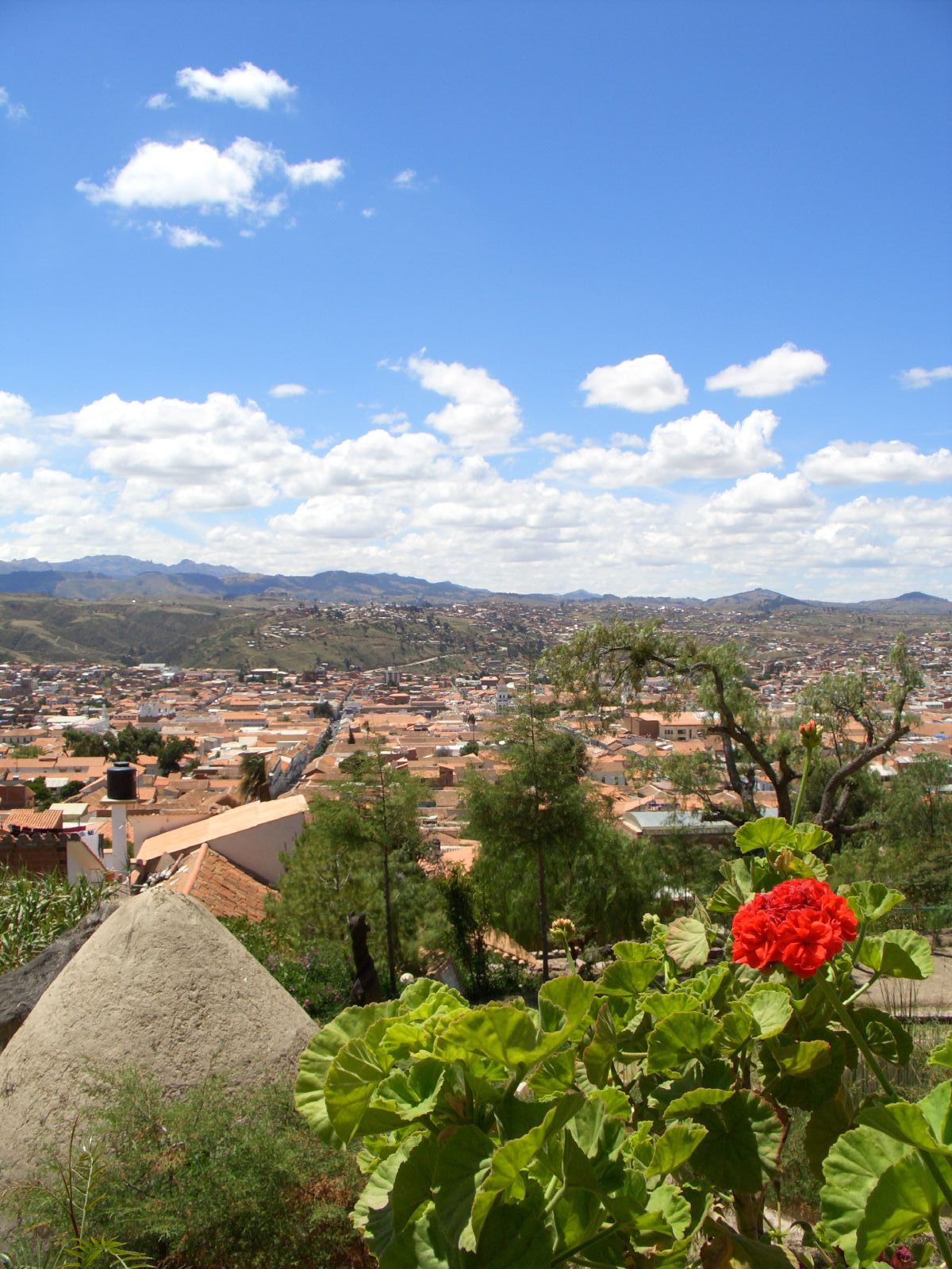 Sucre,Bolivia